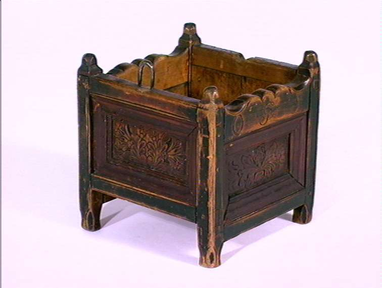 Skeilaup med skåret dekor fra Vågå i Oppland, datert 1788. Høyde 18 cm. Foto Norsk Folkemuseum / Anne-Lise Reinsfelt, NF.1895-0290.